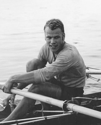 DDR-Meisterschaften im Rudern (Finale am 19.7.70). Hans-Ulrich Schmied